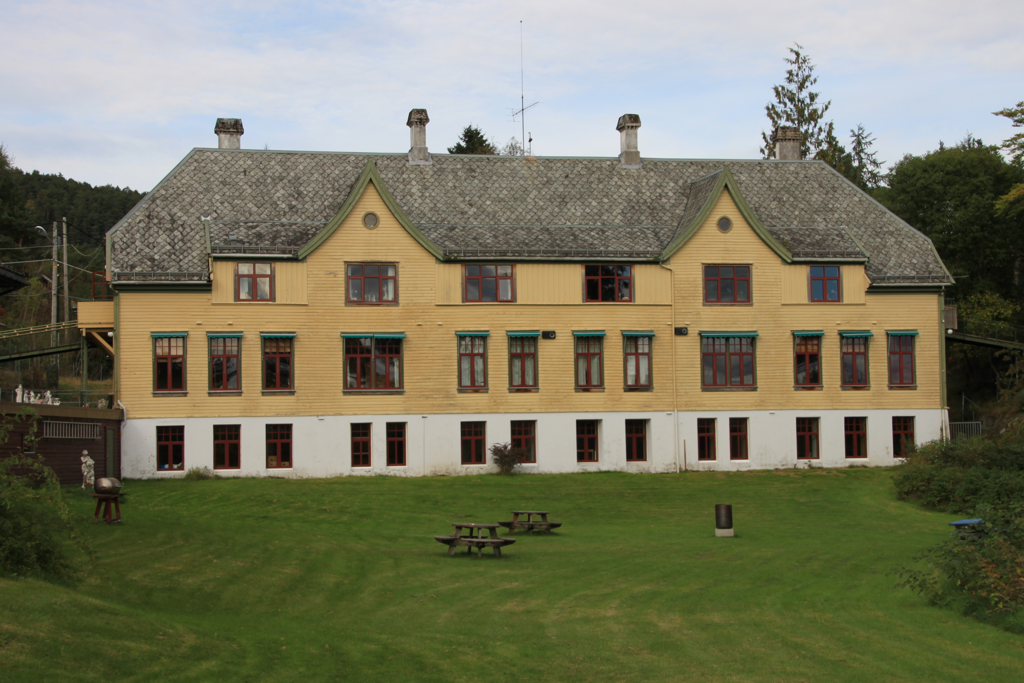 1800-tallet, fjerde kvartal 1900-tallet, tredje kvartal 60°10′34″N 5°22′59″Ø